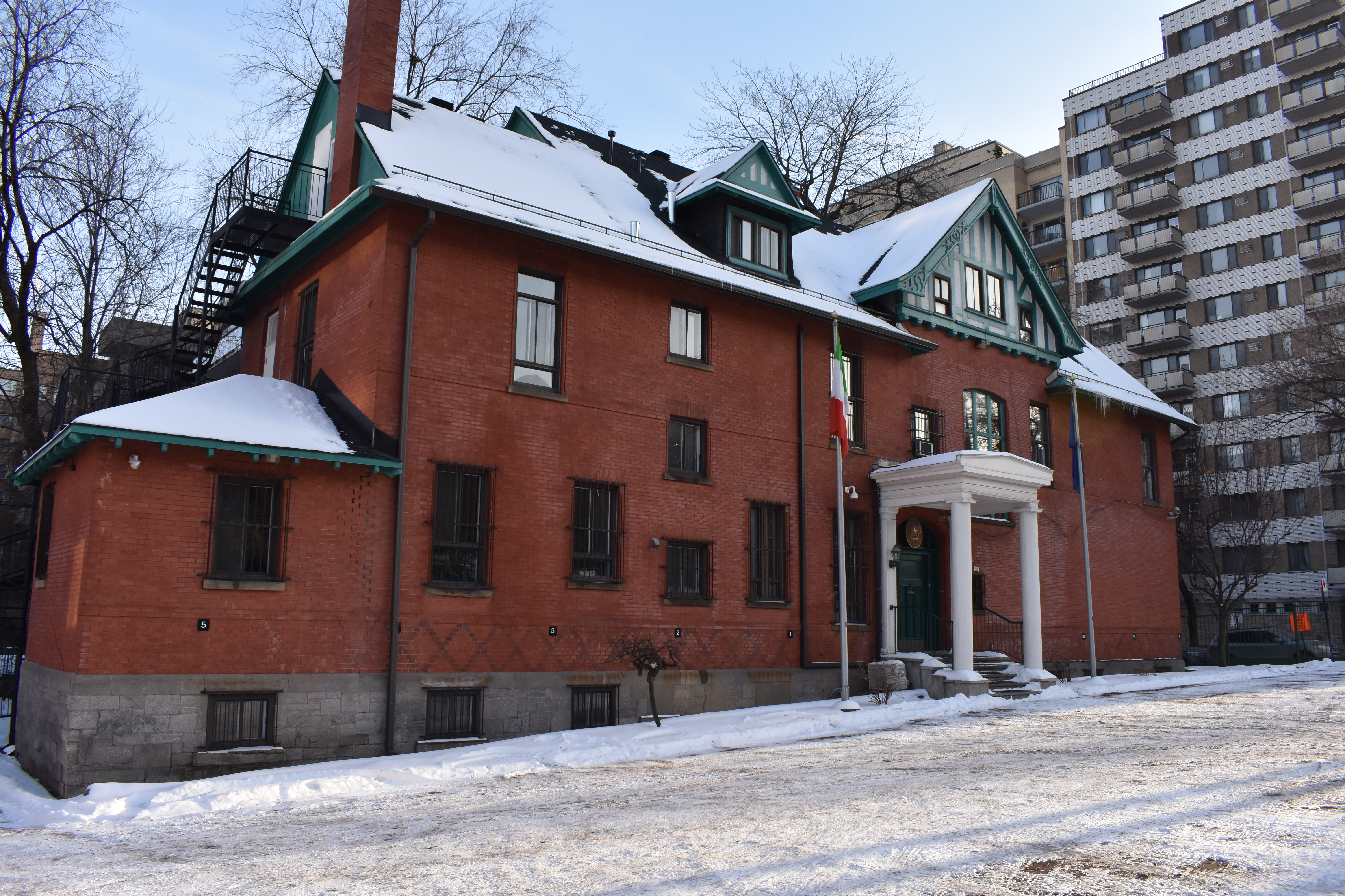 Consulat général d'Italie